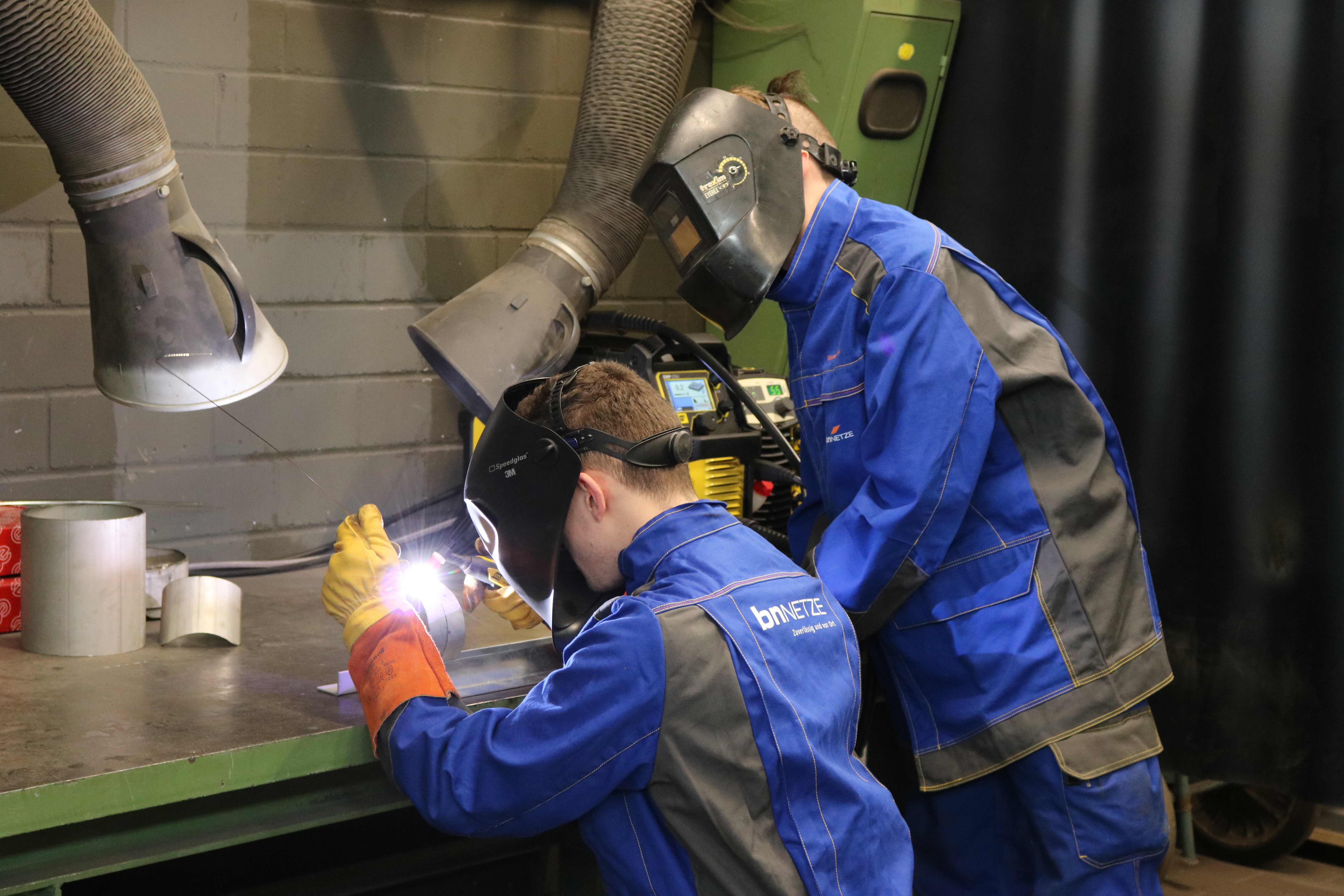 Auszubildende bei BN Netze, Tochter-Unternehmen der badenova AG